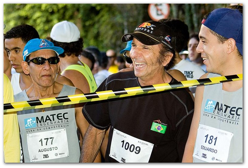 O ex-piloto de Fórmula 1 brasileiro Emerson Fittipaldi assistindo a uma minimaratona.